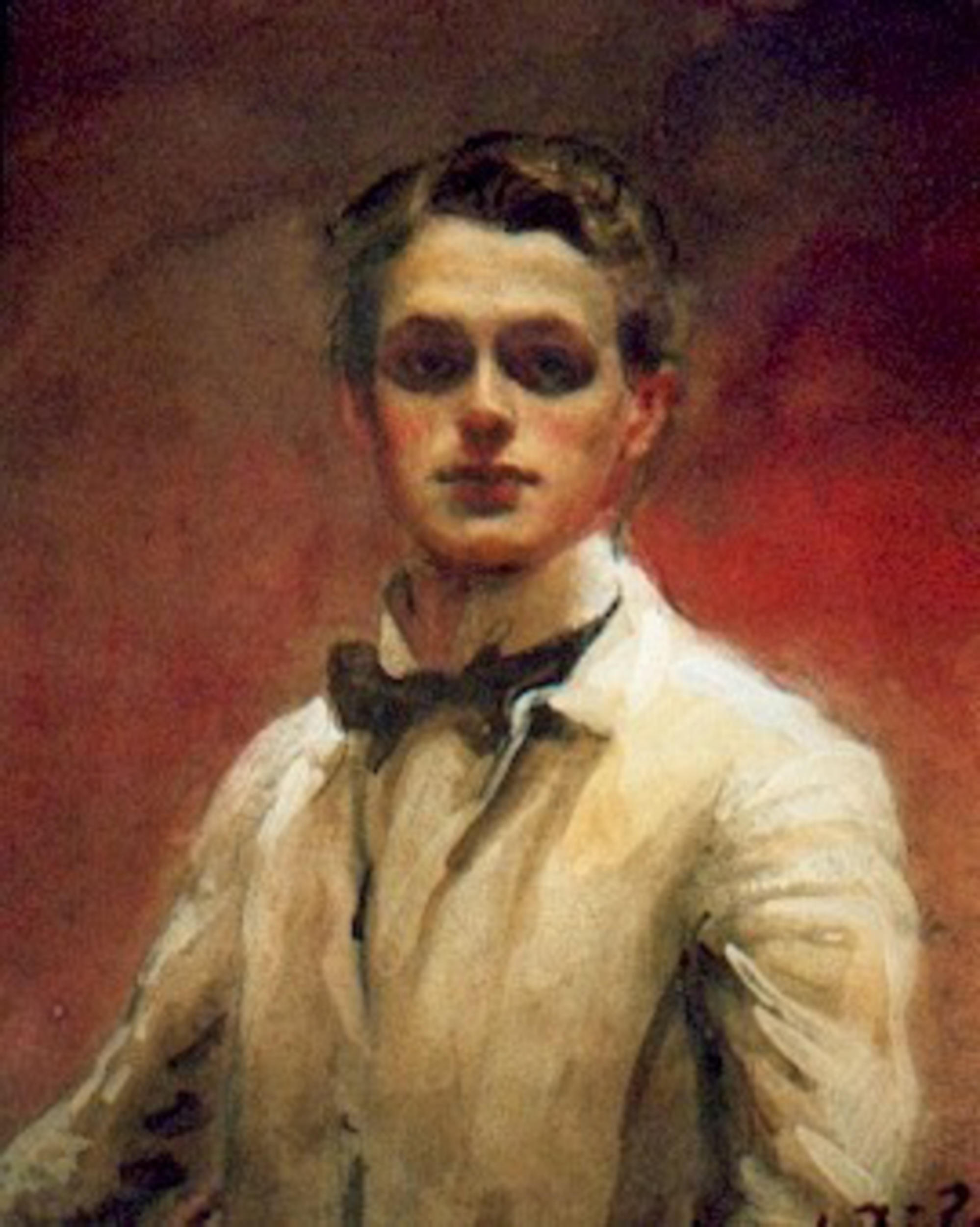 William Ranken, Portrait, 1902.